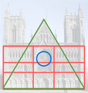 Nidarosdomen, Trondheim. Foto: Dreier.